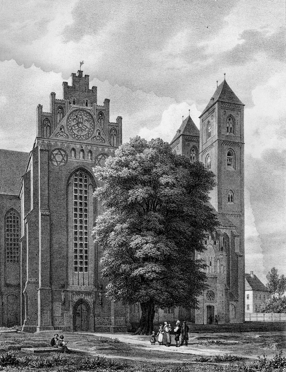 Stendal, Dom St. Nikolaus, aus: Franz Kugler: Architectonische Denkmäler der Altmark Brandenburg. In malerischen Ansichten aufgenommen von J. H. Strack und F. E. Meyerheim, Berlin, L. Sachse, 1833.